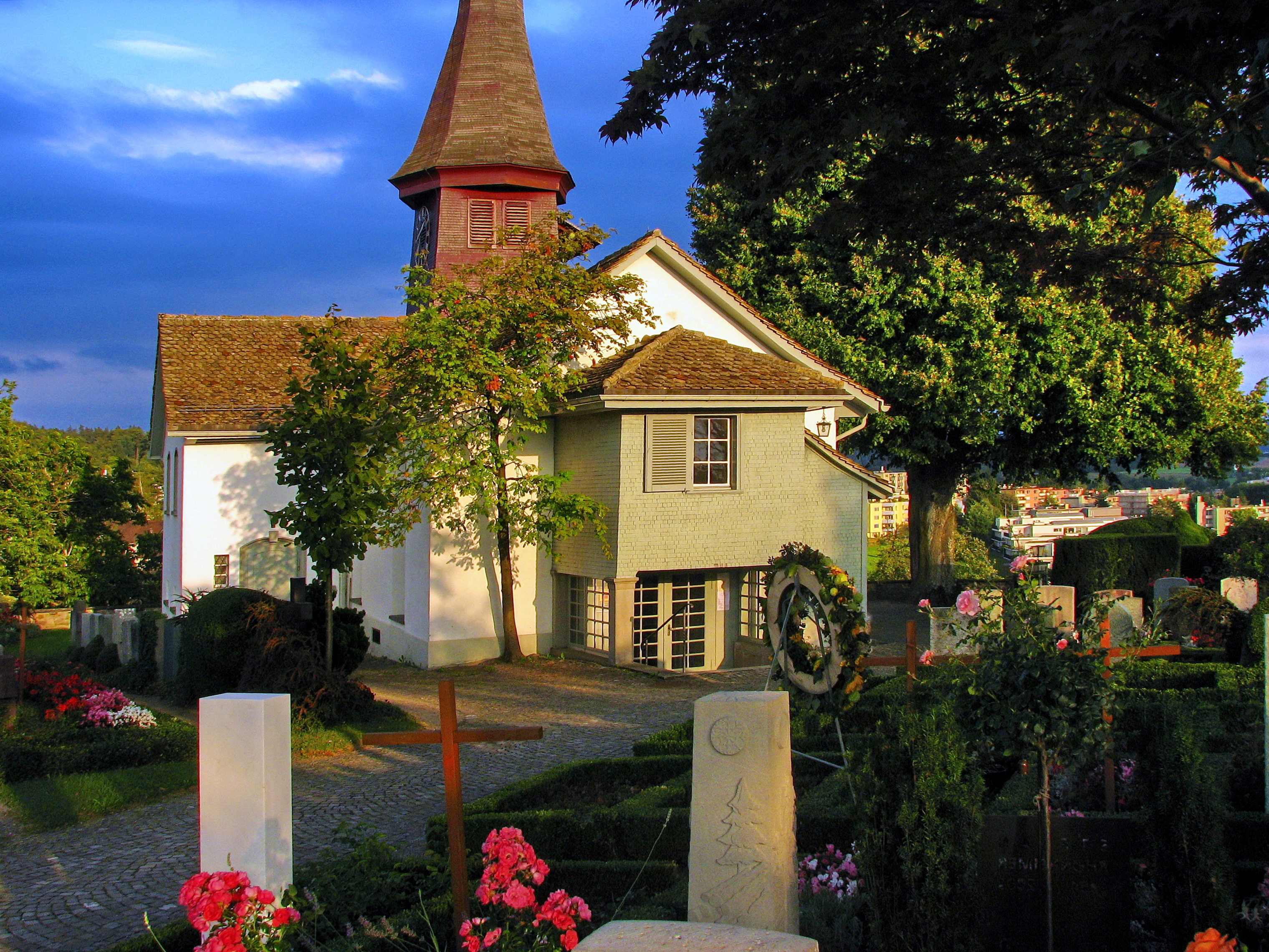 Alte Kirche (Old church) in Zürich-Witikon Switzerland)